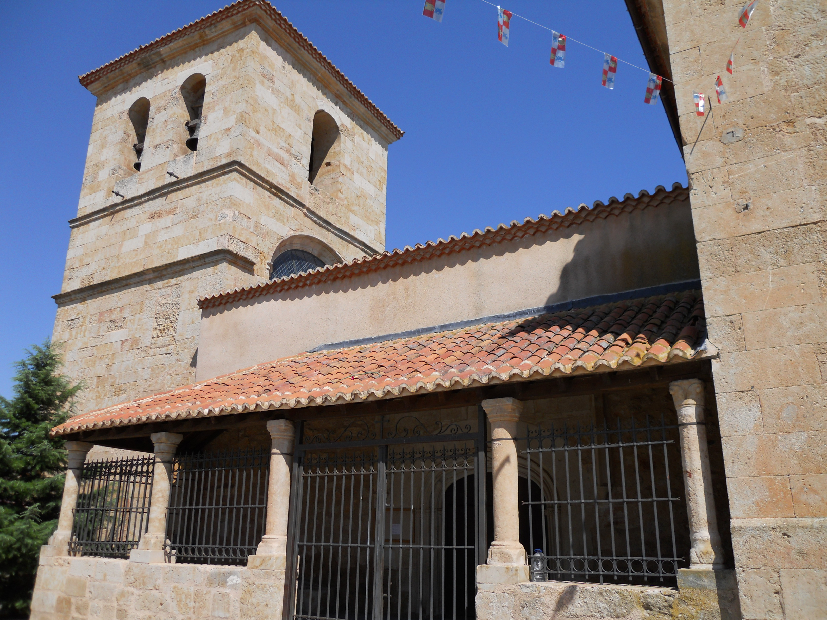 Iglesia de San Juan Bautista de Castellanos de Villiquera.